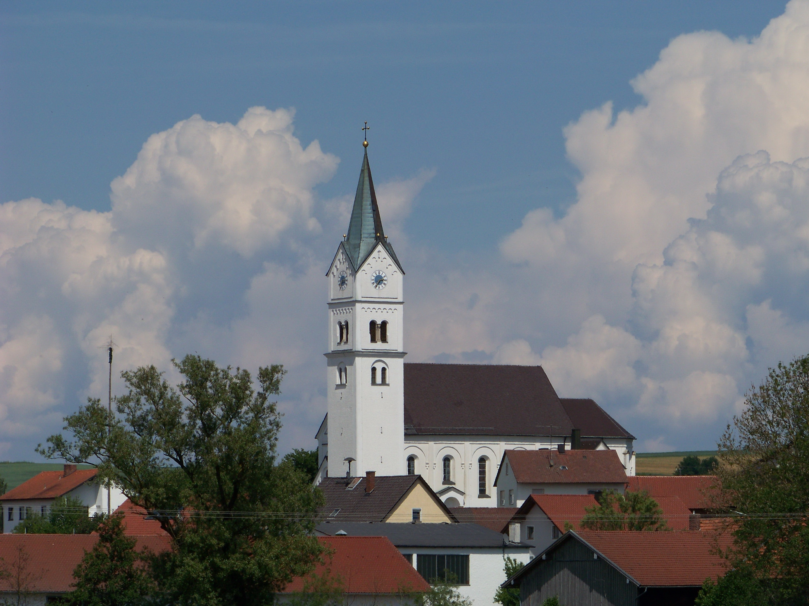 Laberweinting, Hofkirchen 77. Pfarrkirche St. Peter. Erbaut 1863/64; mit Ausstattung; Turmunterbau spätgotisch.